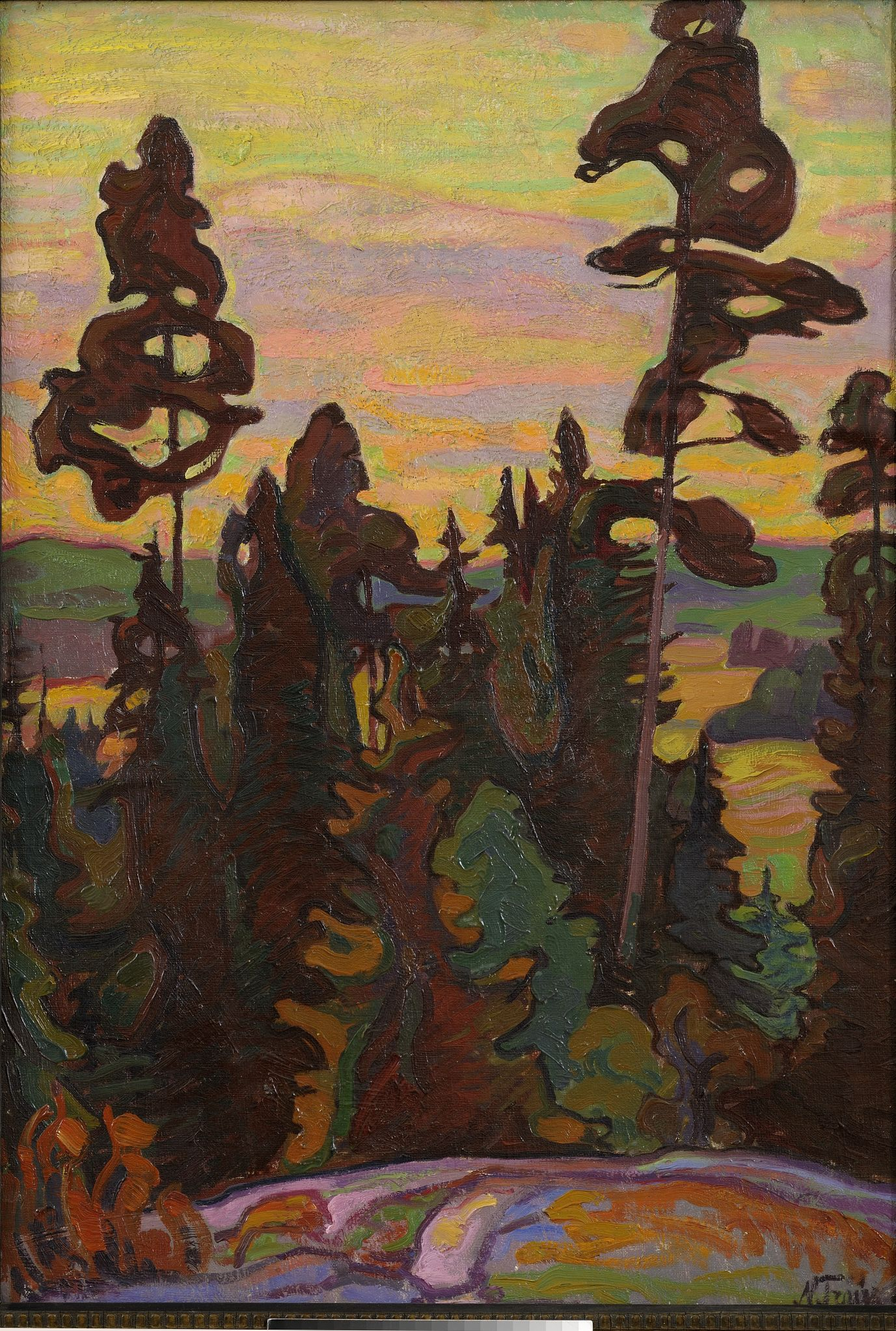 Muuseumikogu Maal Olemus maal Originaal originaal Kunstiese Lisanumbrid foto number: 4426F; negatiivi number: 1774N Säilivus rahuldav